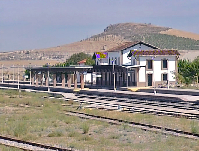 La estación de Moreda en 2009